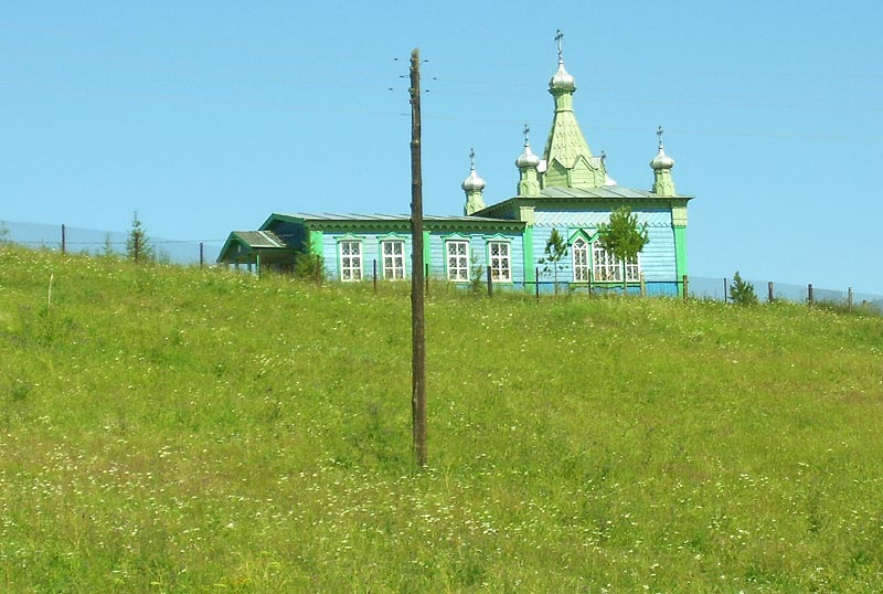 Ыб. Сыктывдинский район, Республика Коми. Часовня во имя святого Епископа Великопермского